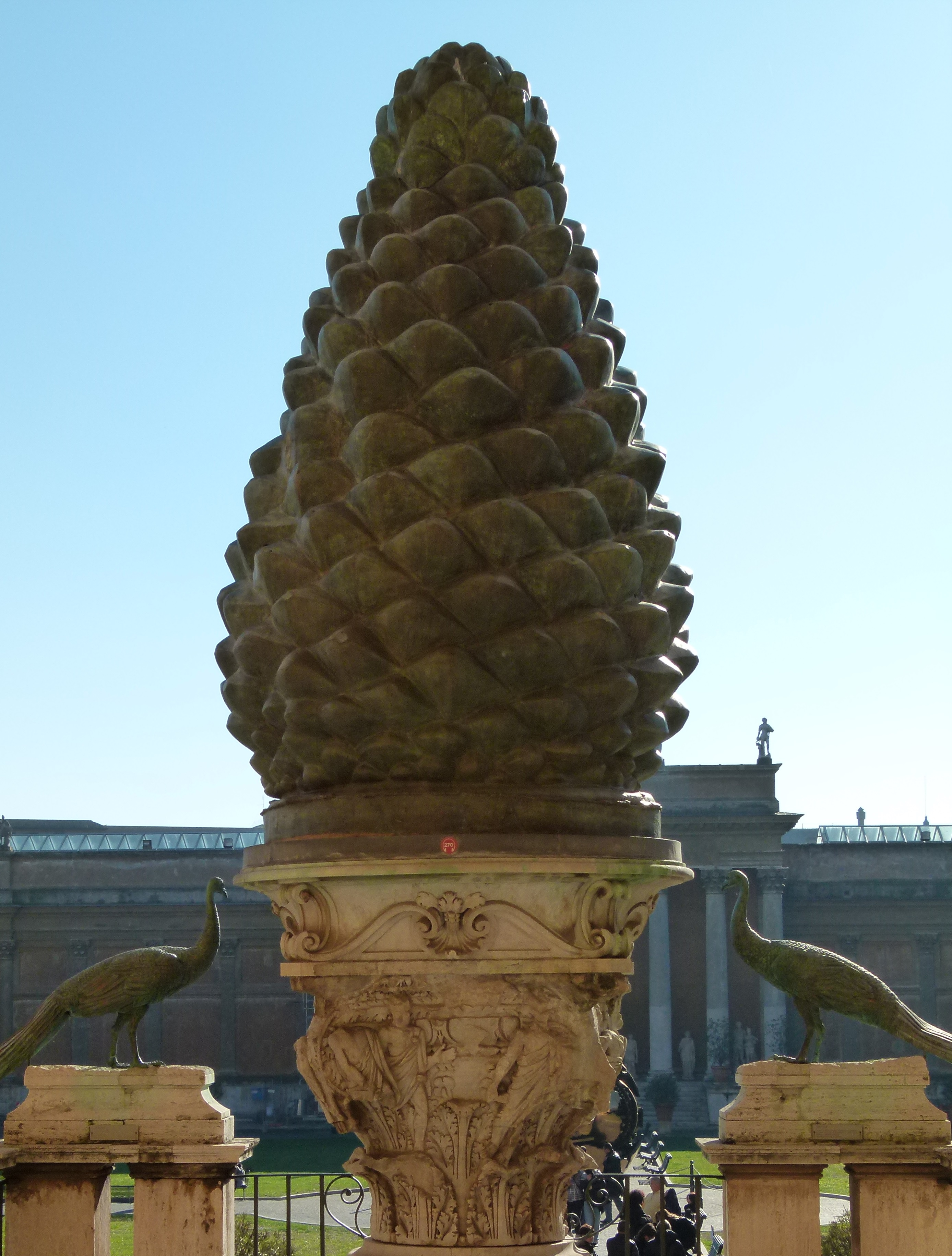 This photo was taken with Panasonic Lumix DMC-FZ100 camera, thanks to Panasonic.You can see all photographs in category: Taken with Panasonic Lumix DMC-FZ100.